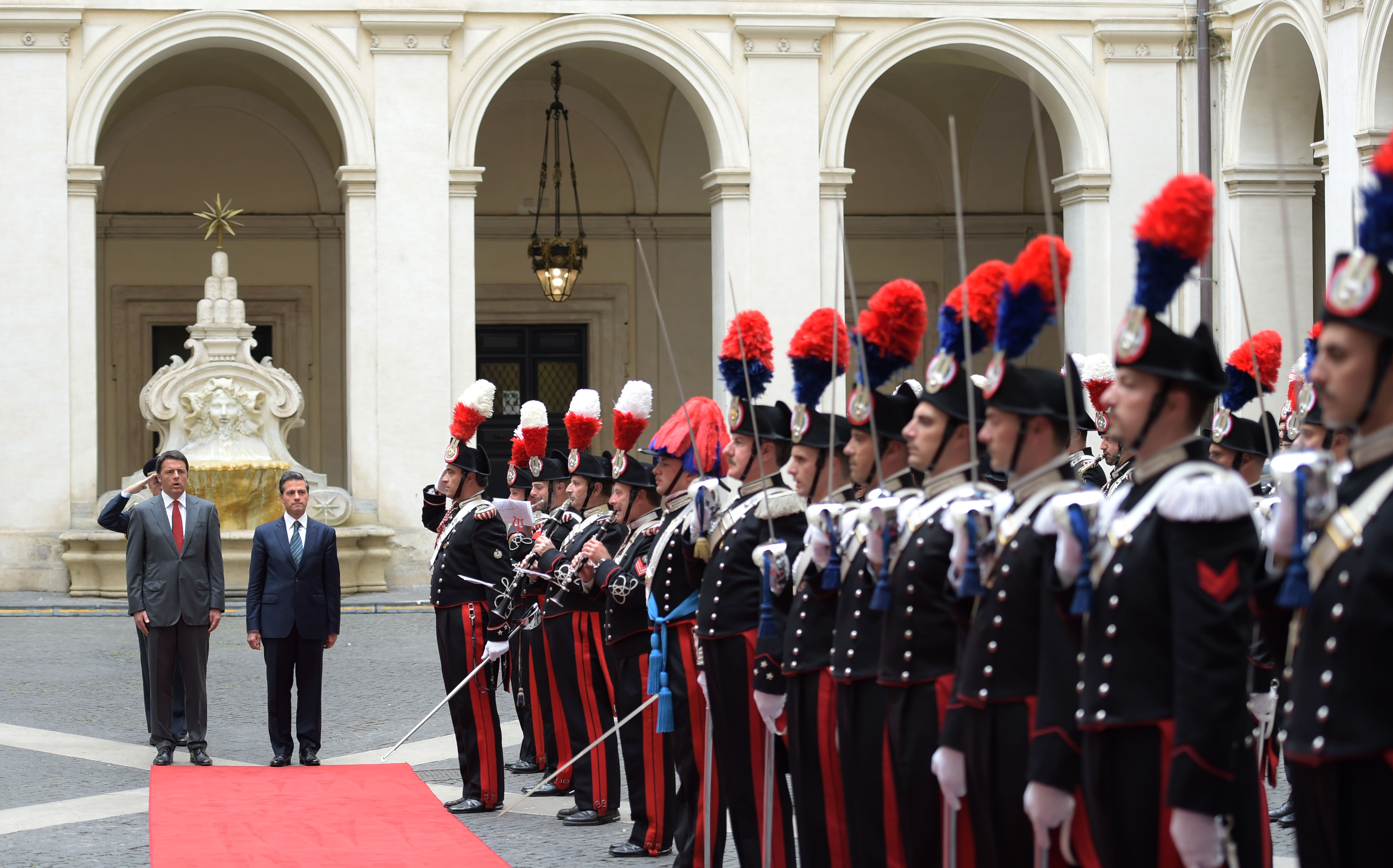 Ceremonia de bienvenida en el Palacio Chigi y reunión con el Excmo. Sr. Matteo Renzi, Presidente del Consejo de Ministros de la República Italiana. Roma, Italia. 15 de junio de 2015.